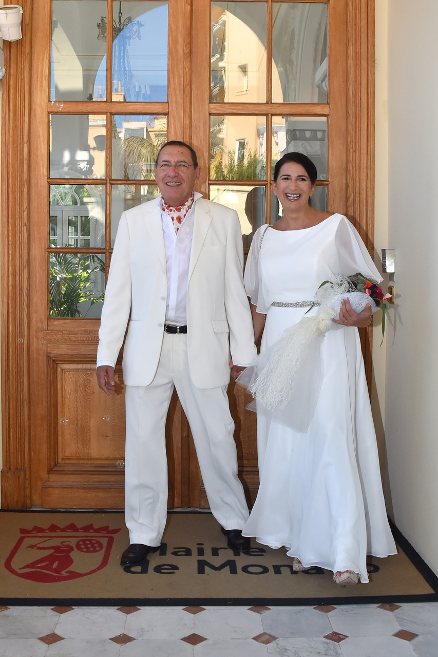 Il matrimonio di Jocelyn Hattab con Alessandra Chianese Hattab